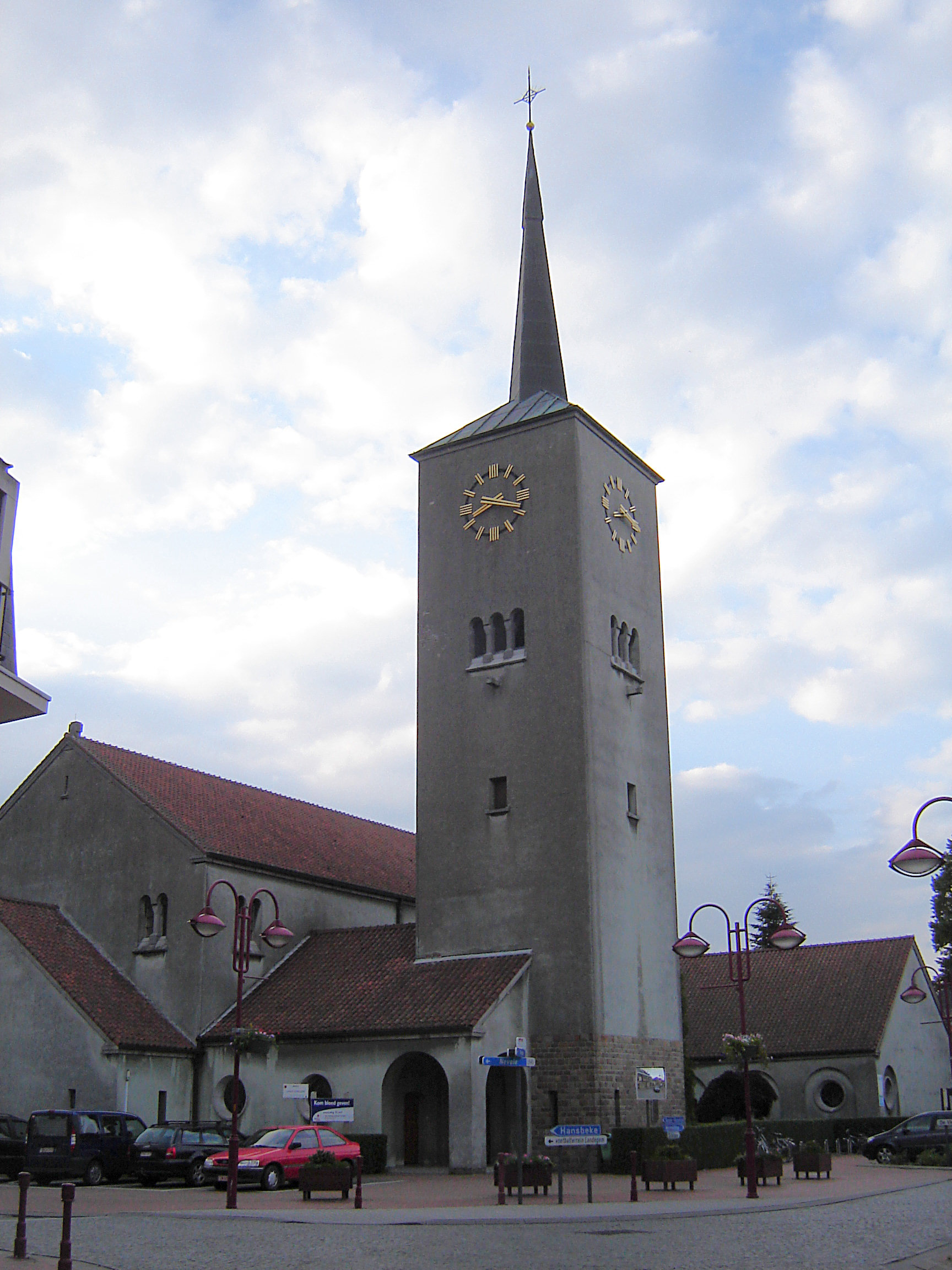 Sint-Blasius en Sint-Margrietkerk in Landegem. Church of Saint Blaise and Saint Margaret in Landegem. Landegem, Nevele, East Flanders, Belgium